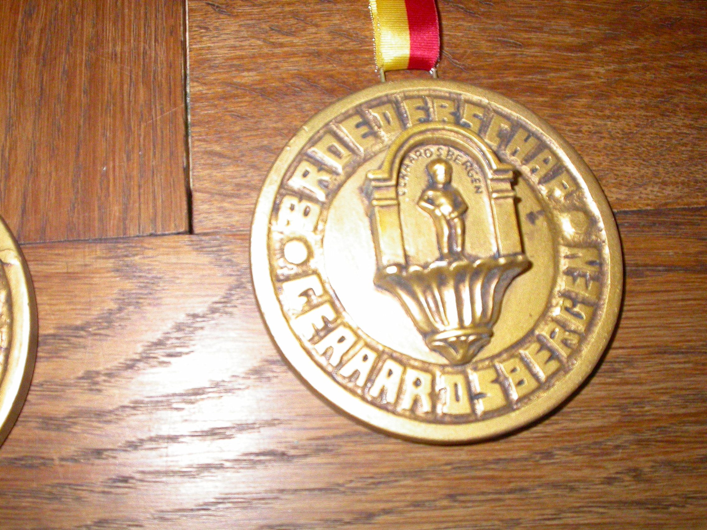 Medaillon van het Broederschap van het Geraardsbergs Manneken Pis, eigen foto, GFDL Categorie:Geraardsbergen